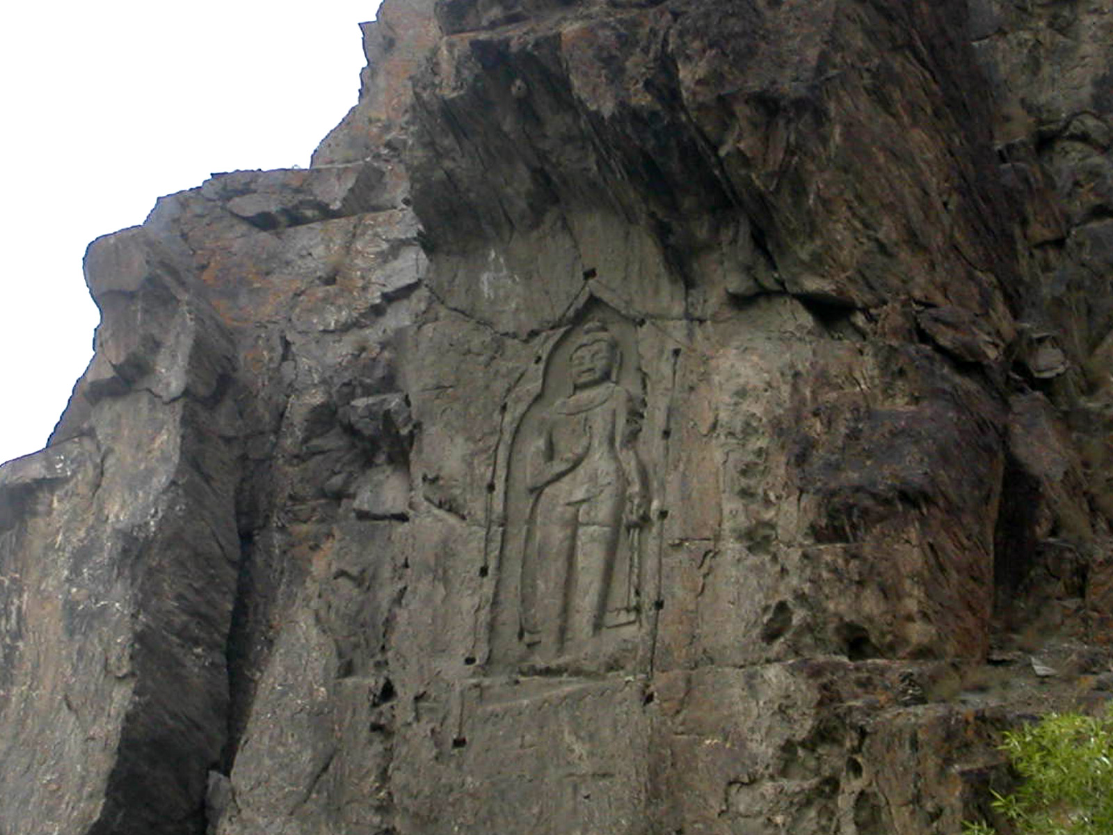 Buddha at Kargah Gilgit, Pakistan